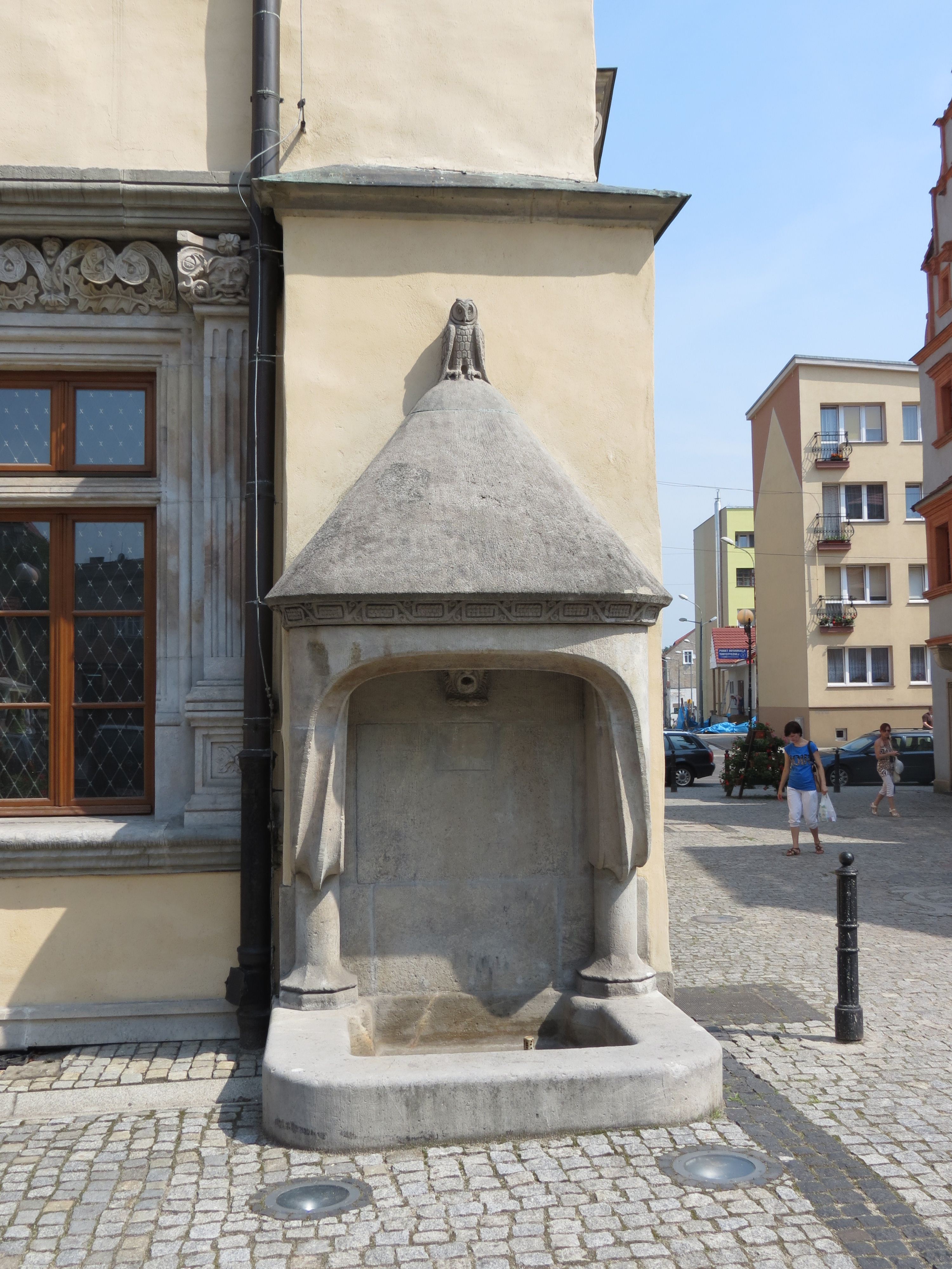 Lwówek Śląski, ratusz, 1522, 1545, 1905